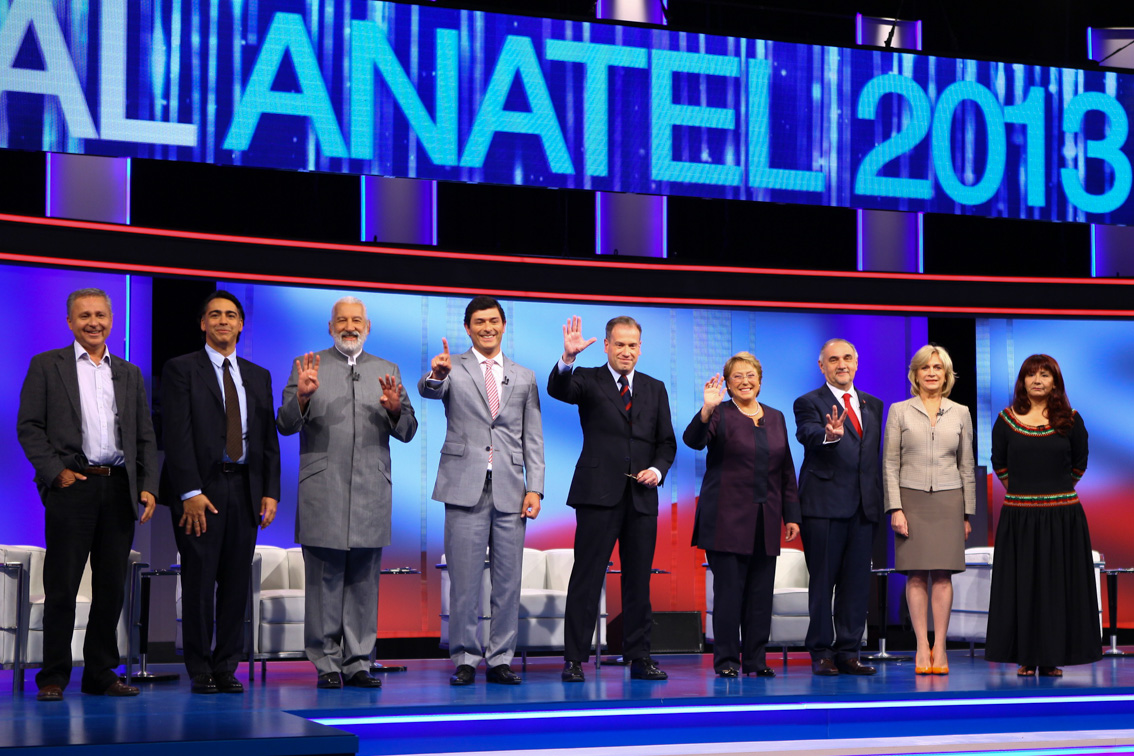 Debate presidencial Anatel 2013.